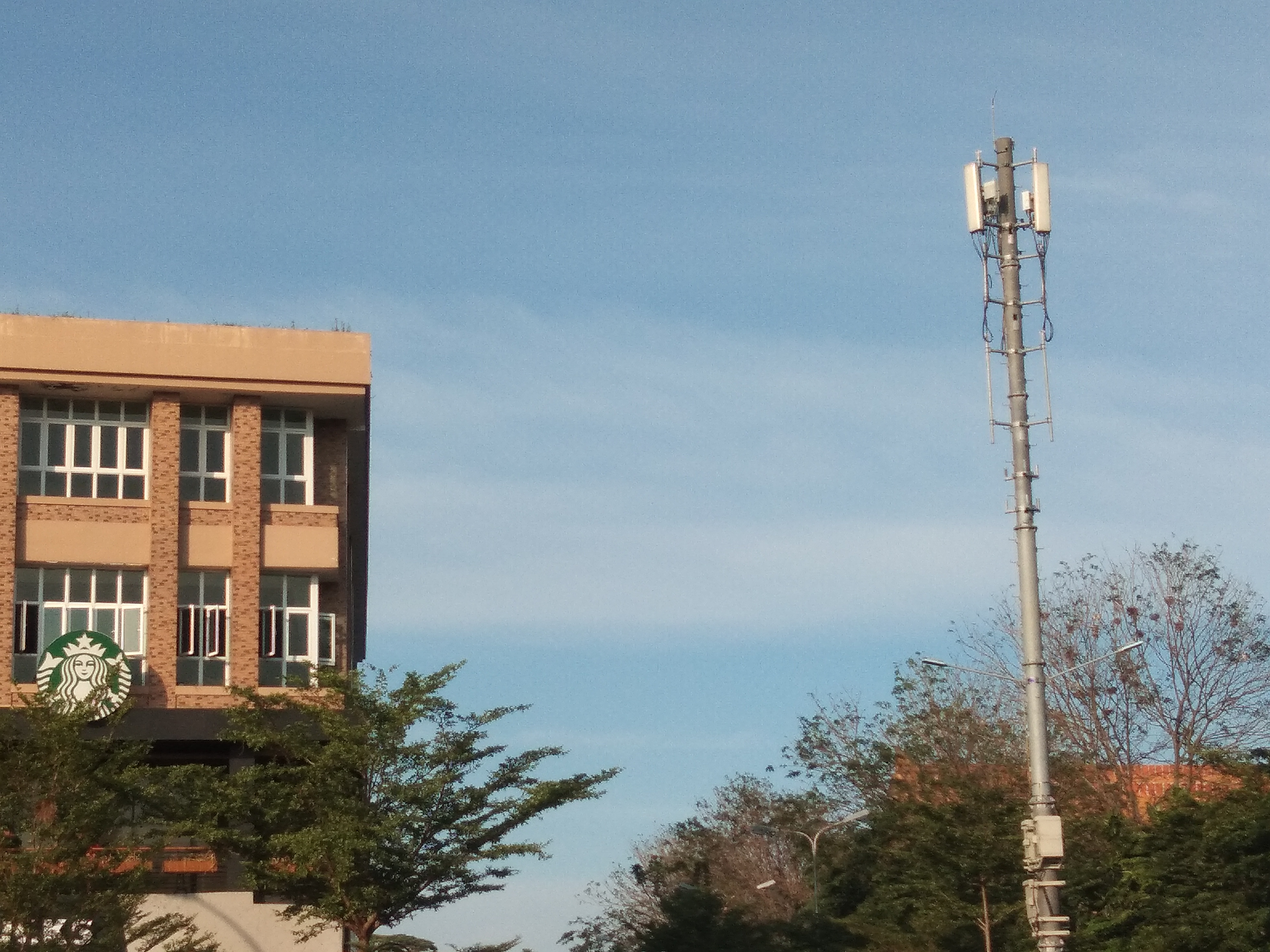 Pemandangan Langit di Komplek Cemara Asri